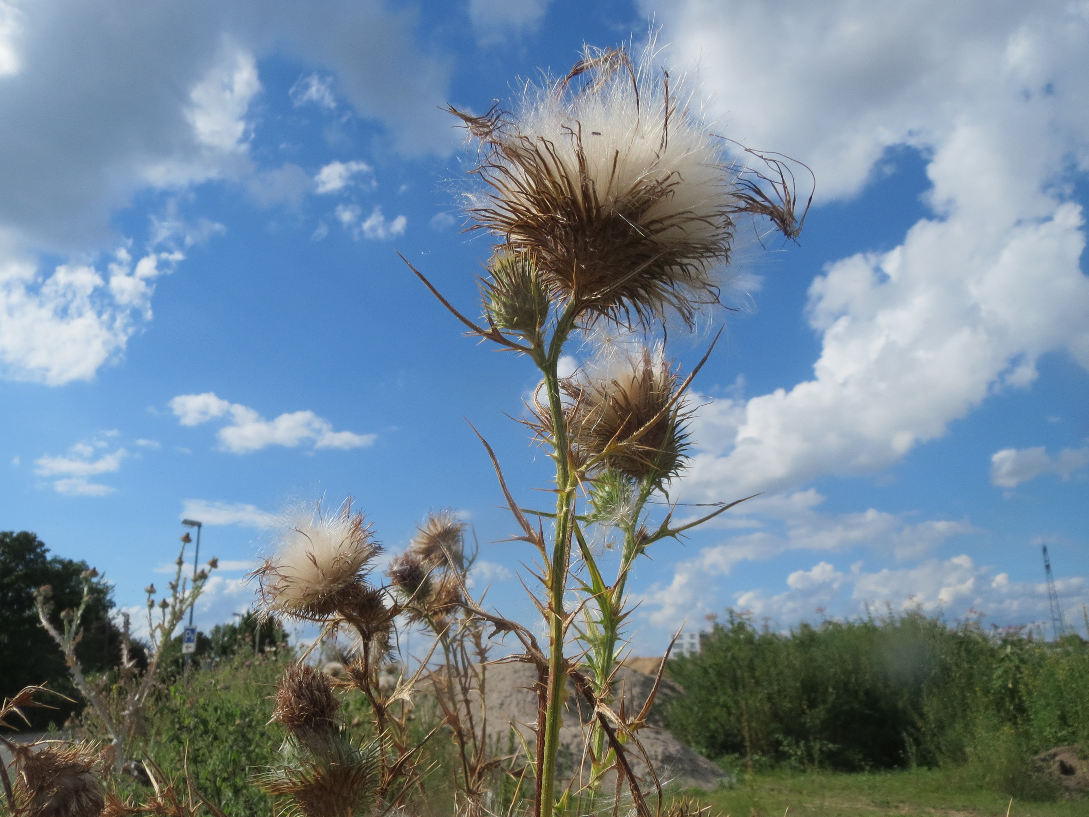 Samenstand der Gewöhnlichen Kratzdistel (Cirsium vulgare) auf einer Ruderalfläche in Hockenheim-Talhaus